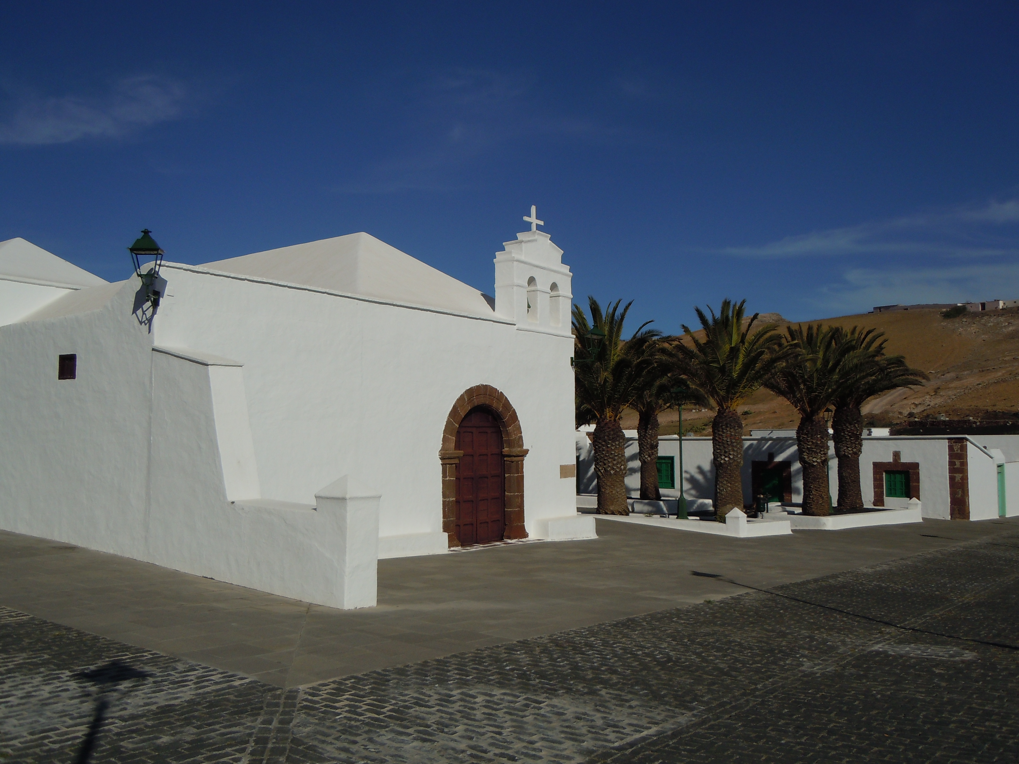 Église San Marcial de Rubicón, Femés, Lazarote.